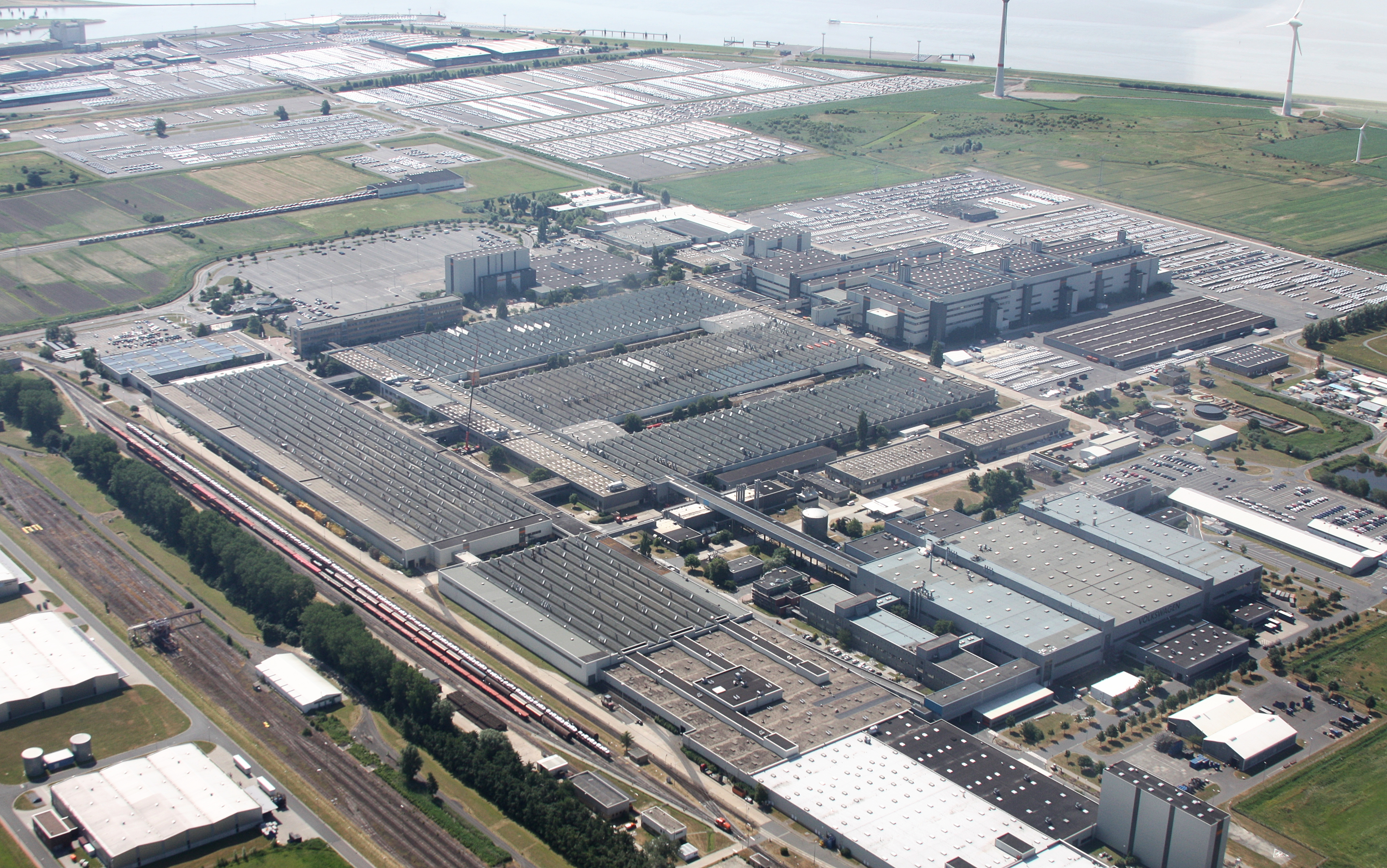 Flug über Emden; Flughöhe 1500 ft; Juli 2010; Originalfoto bearbeitet: Tonwertkorrektur und Bild geschärft mit Hochpassfilter